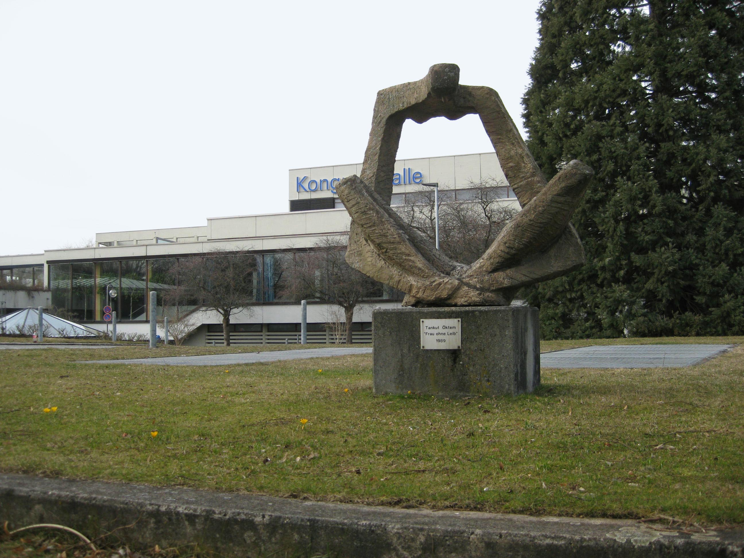 Tankut Öktem, Frau ohne Leib, 1989, Kongresshalle Böblingen, Deutschland